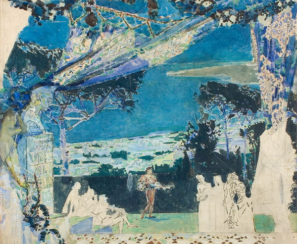 Ескіз театрально завіси варіант 1.jpg: акварель